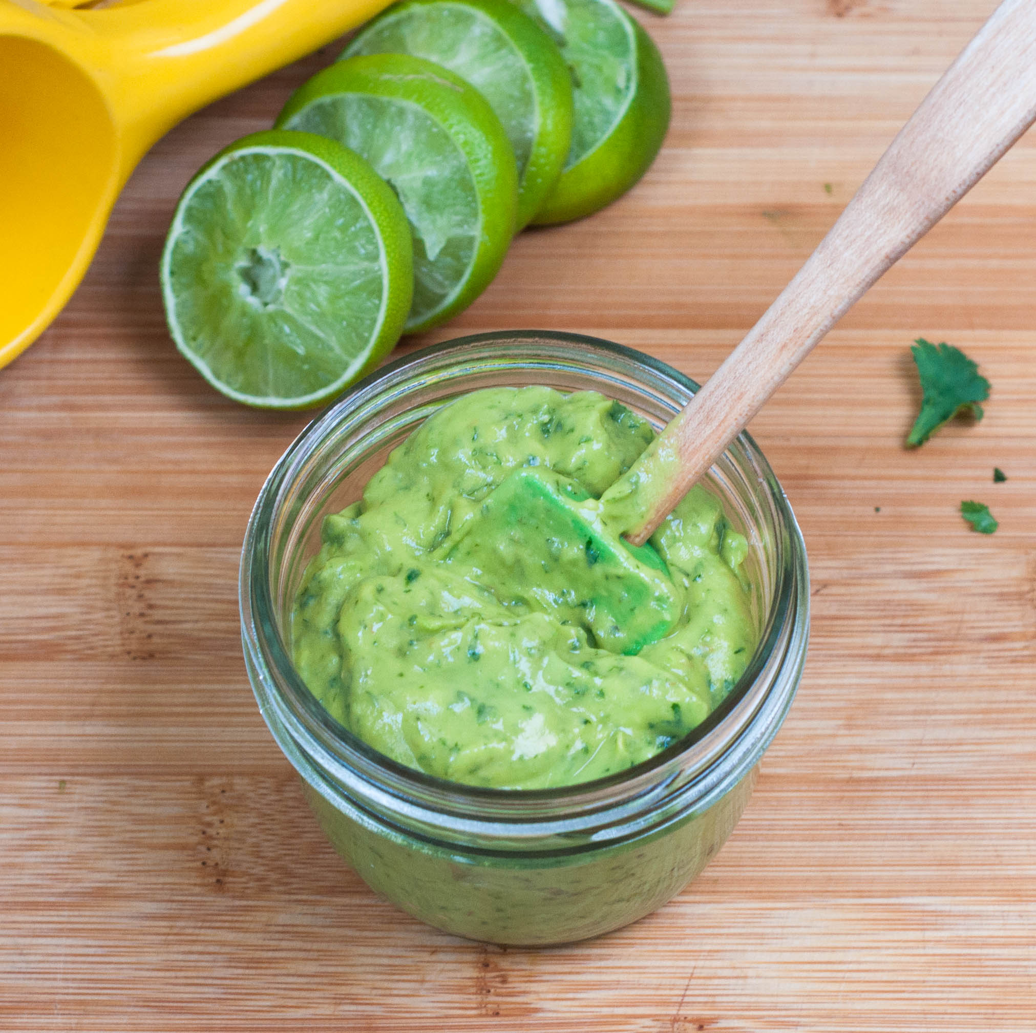 Avocado lime sauce